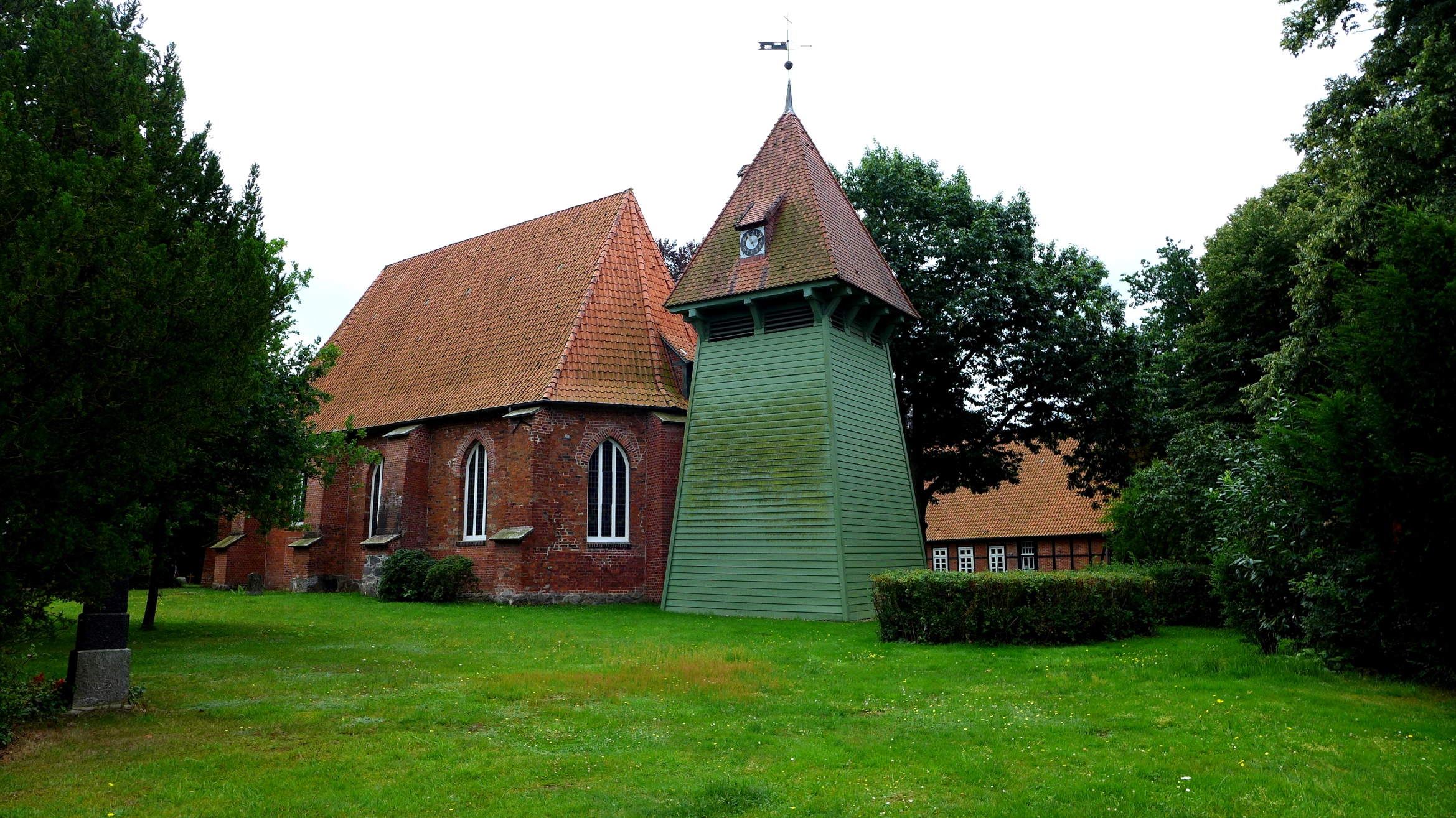 Katharinen-Kirche in Embsen. Aufnahmedatum 2016-07.